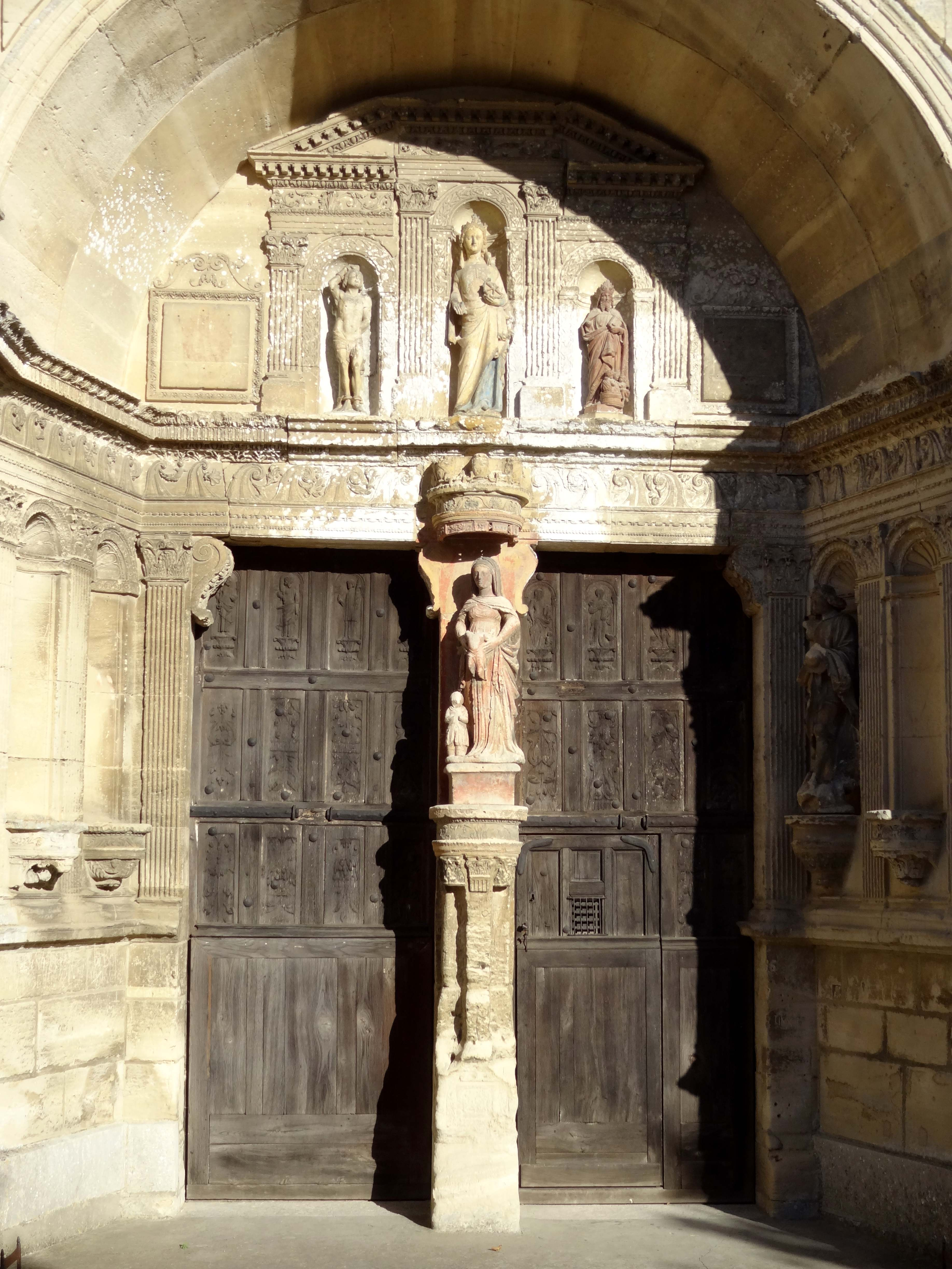 Église Saint-Gervais-et-Saint-Protais de Saint-Gervais (voir titre).